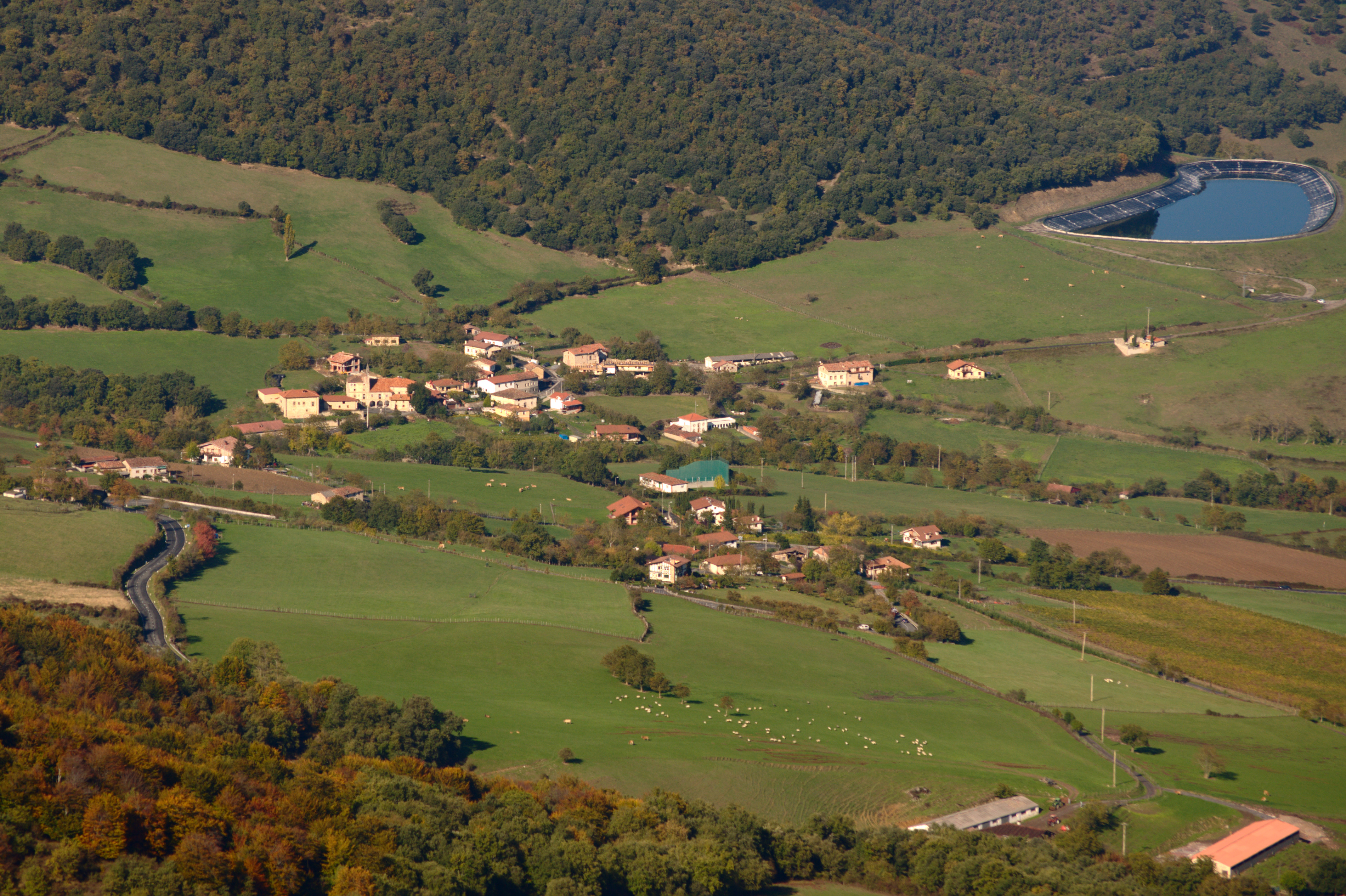 Tertanga auzoko (Amurrio, Araba) ikuspegi orokorra.